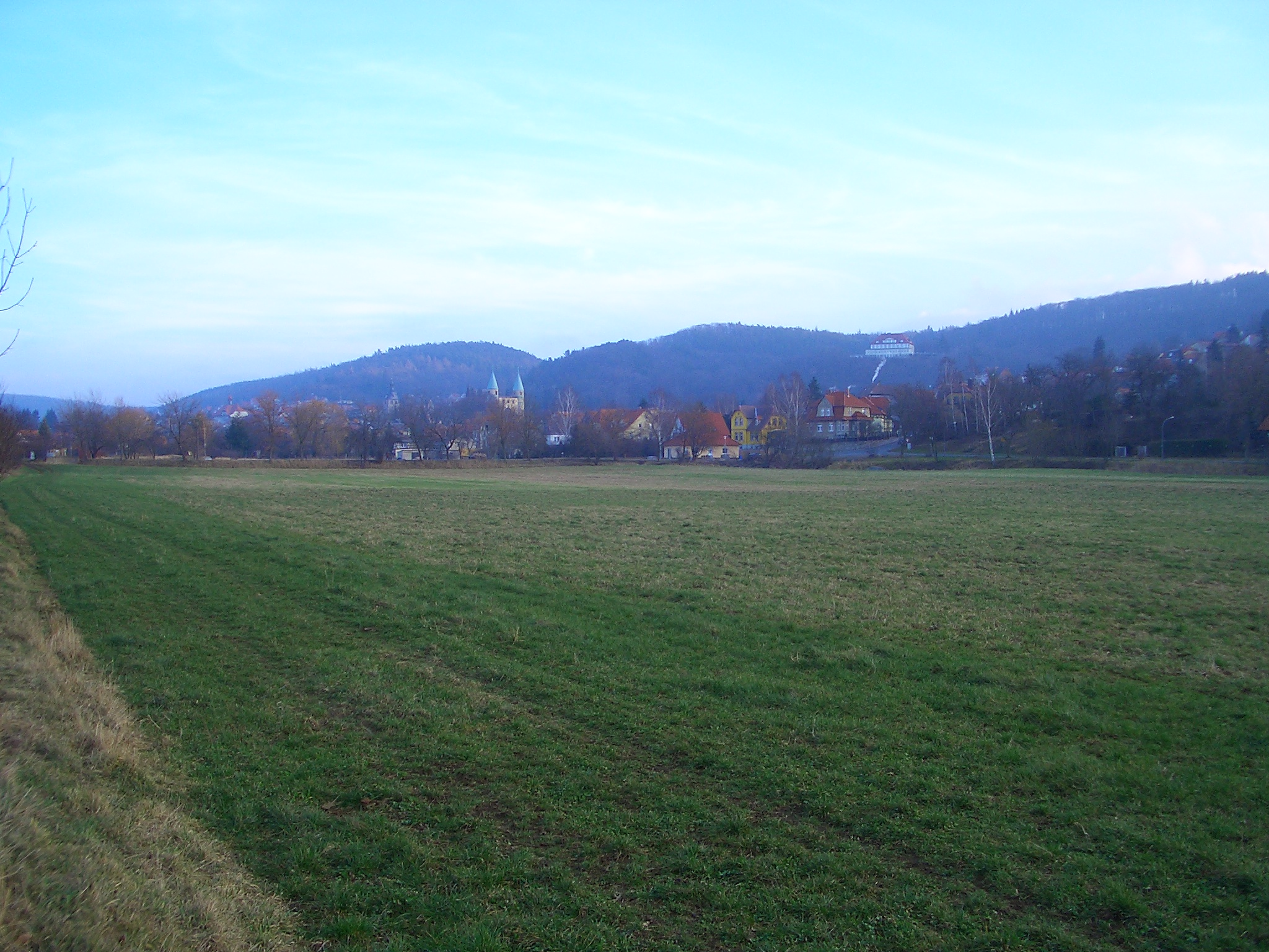 Gernrode